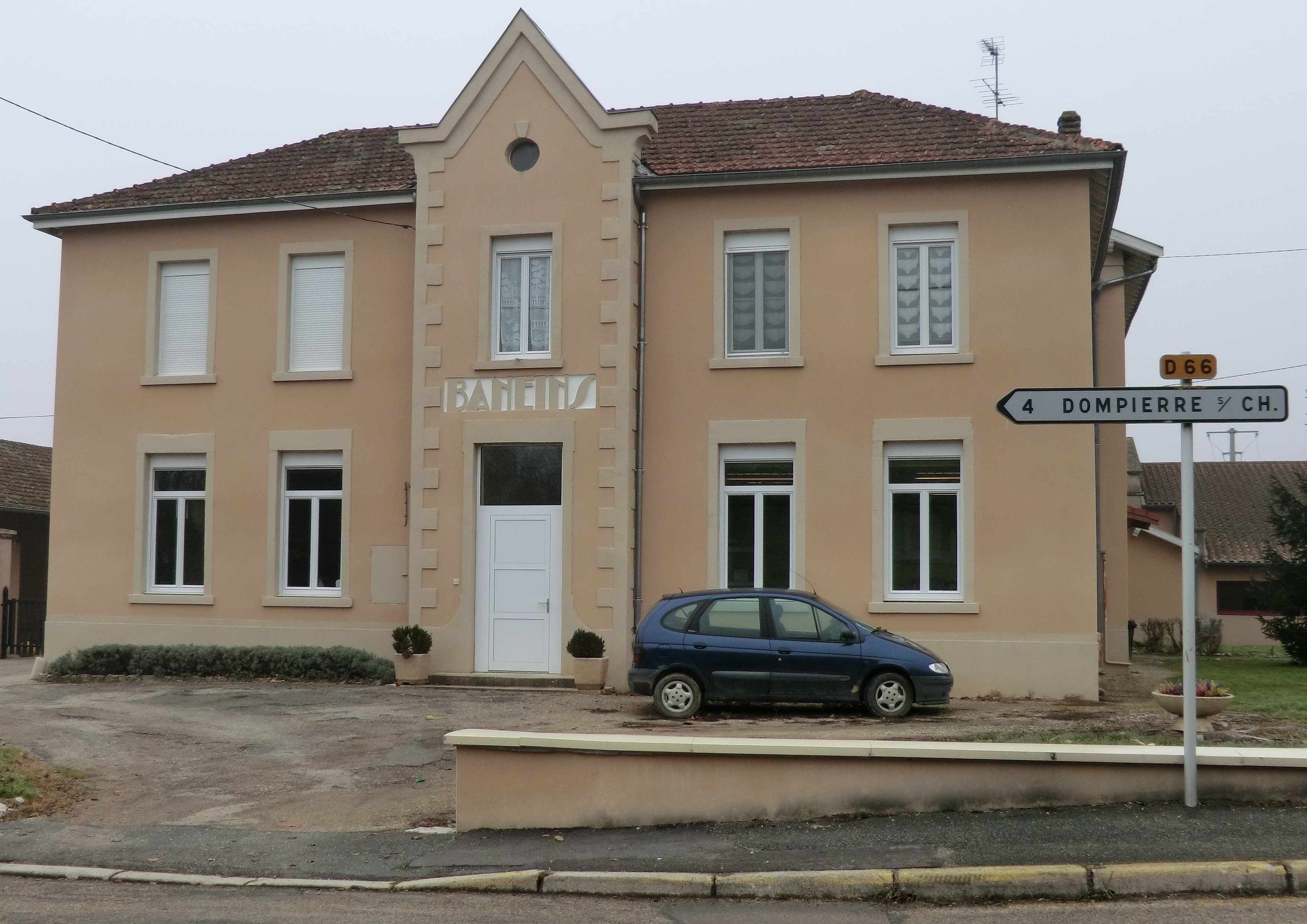 Mairie de Baneins en décembre 2013.